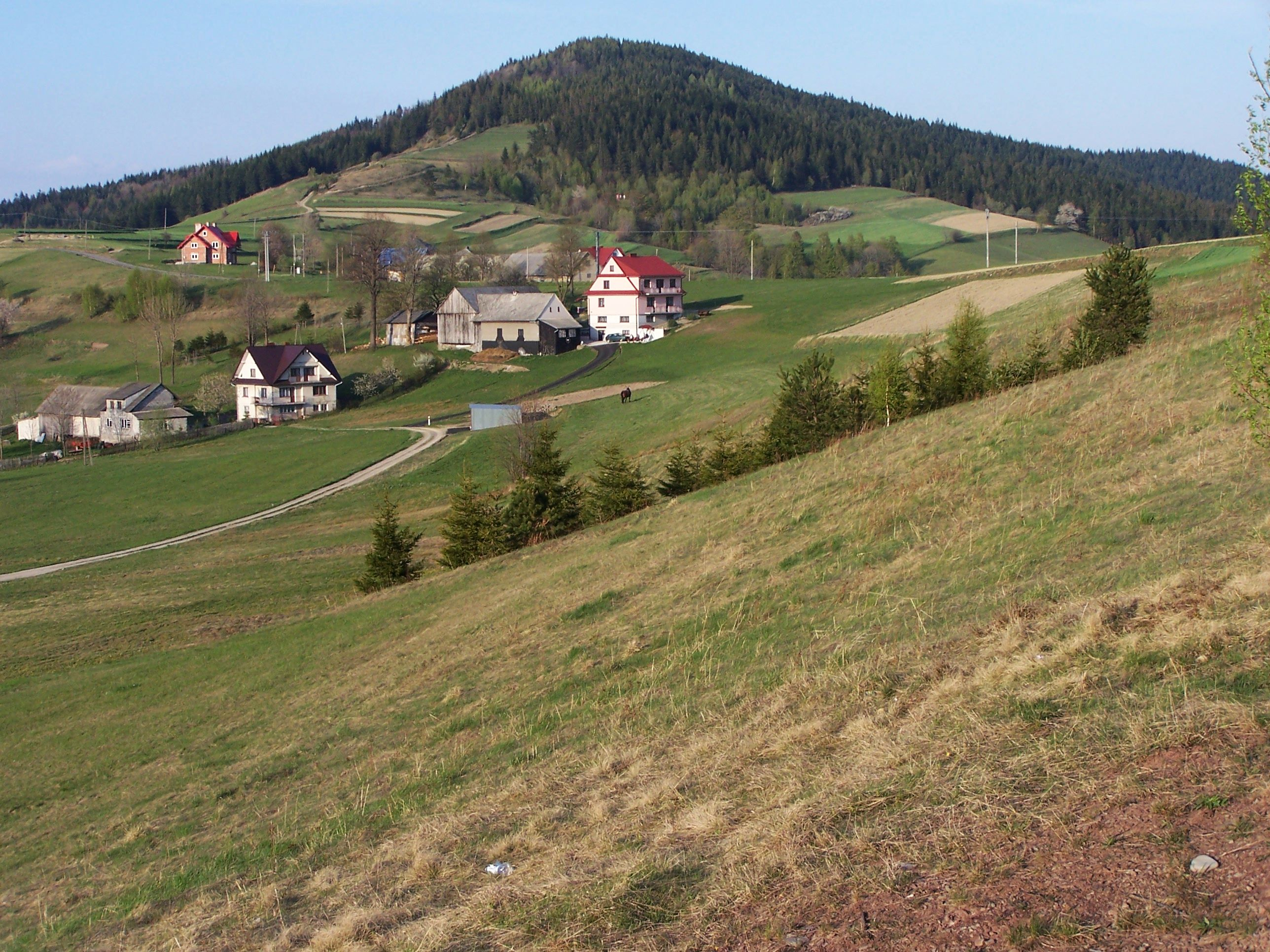 Cichoń (Beskid Wyspowy). Osiedle Piechotówka (Słopnice)